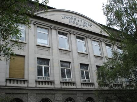 Firma Linden und Funke